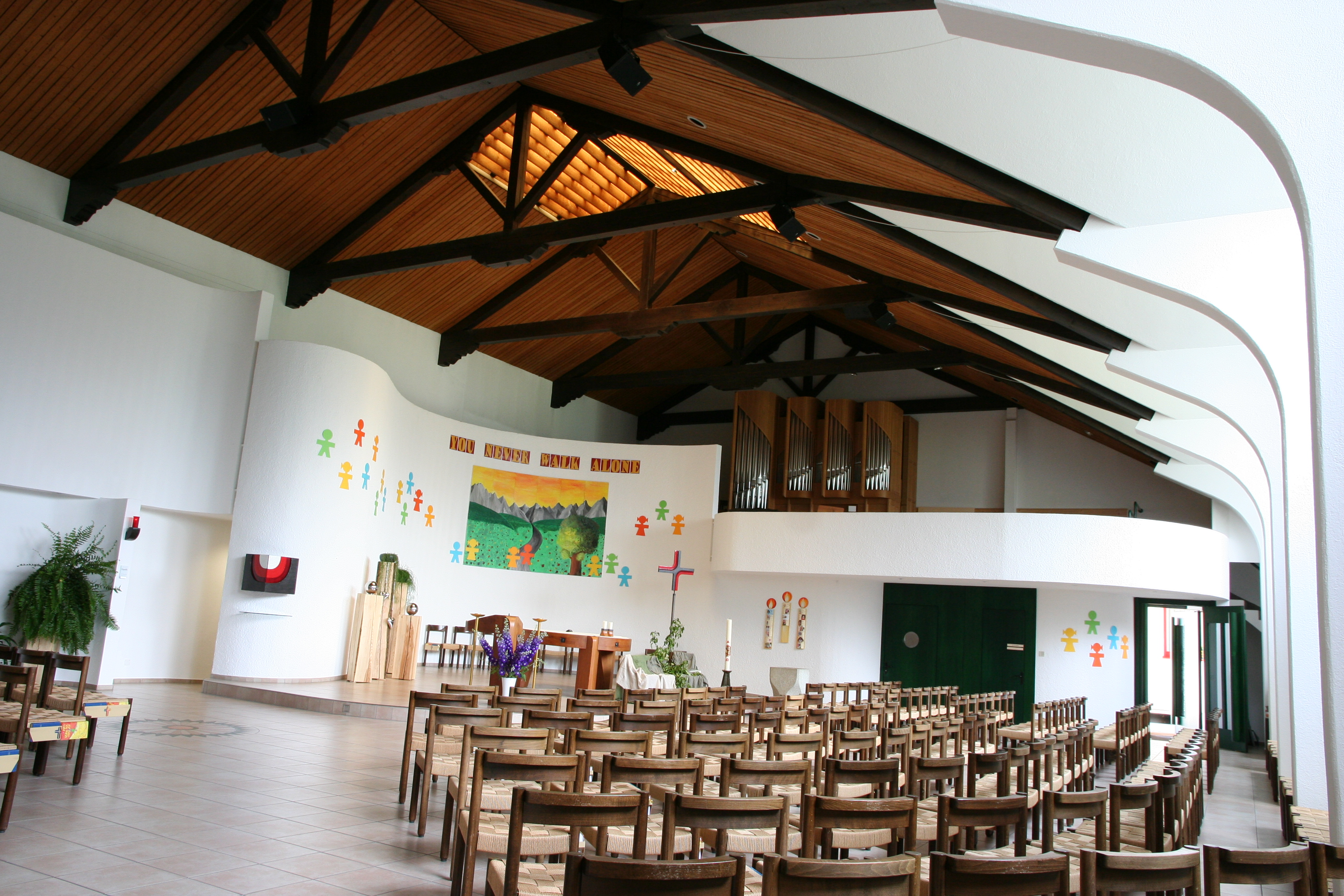 Römisch-katholische Pfarrkirche Liebfrauen Hinwil, Innenansicht